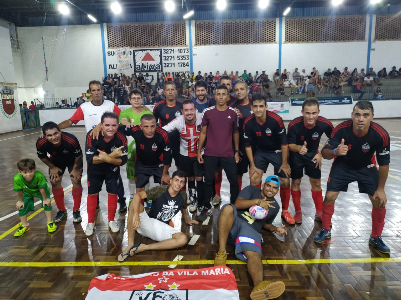 Equipe campeã da Copa Regional Sicoob Credicoop 2020 de Futsal em Pitangui. Comemoração.